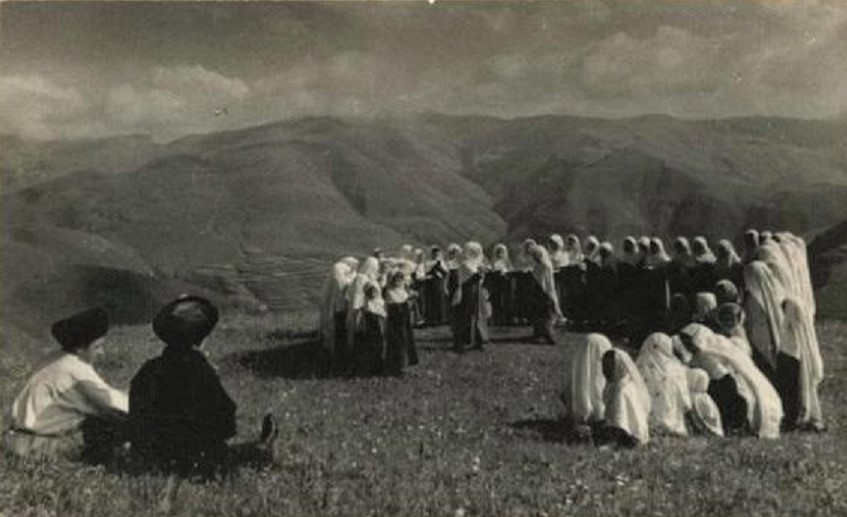 Дагестан. Кубачинская лезгинка